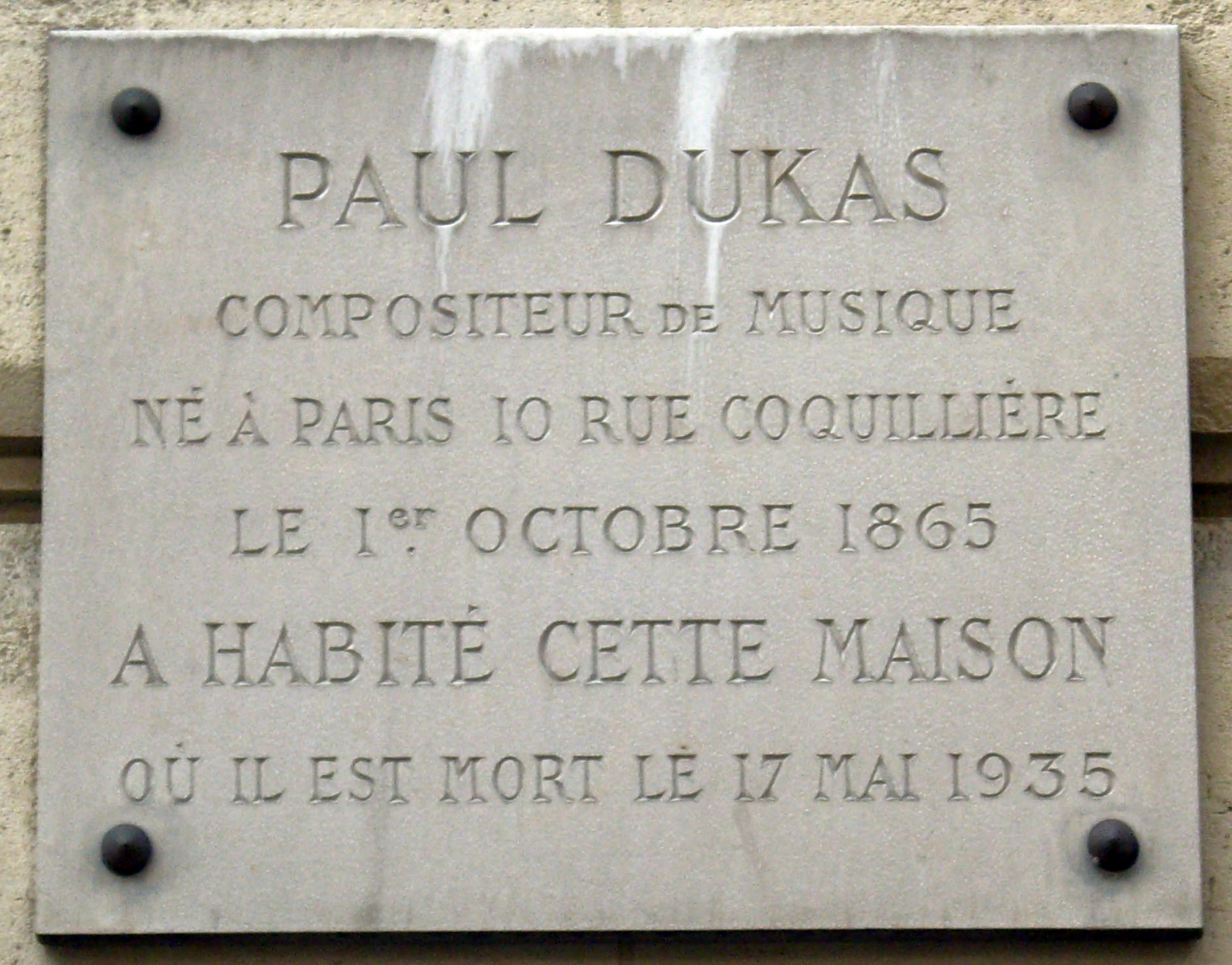 Plaque apposée au n° 84 de la rue du Ranelagh, Paris 16e, où vécut le compositeur Paul Dukas (1865-1935) et où il est mort le 17 mai 1935.